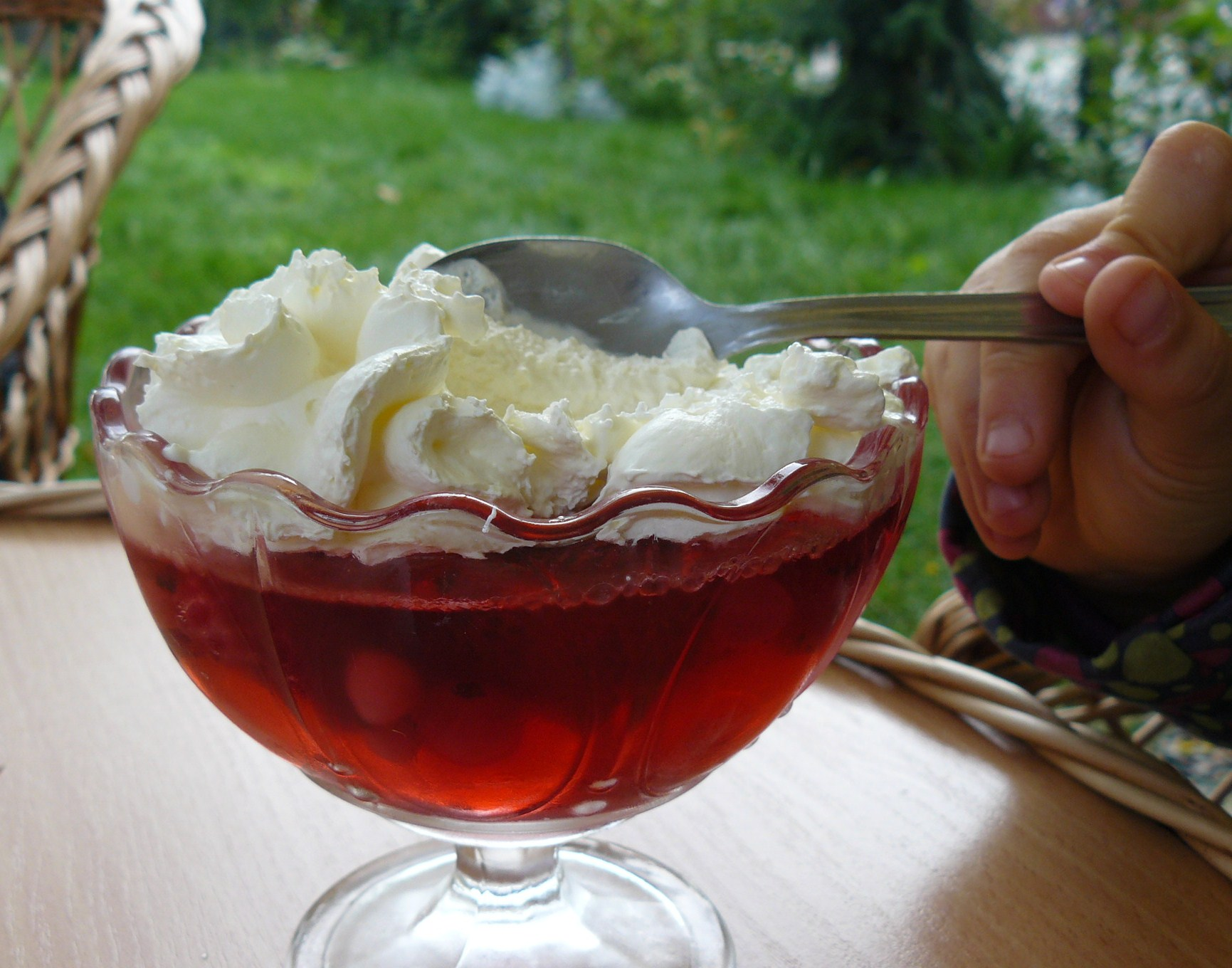 Szachulcowa kawiarnia-restauracja w Poznaniu przy Śluzie Katedralnej.